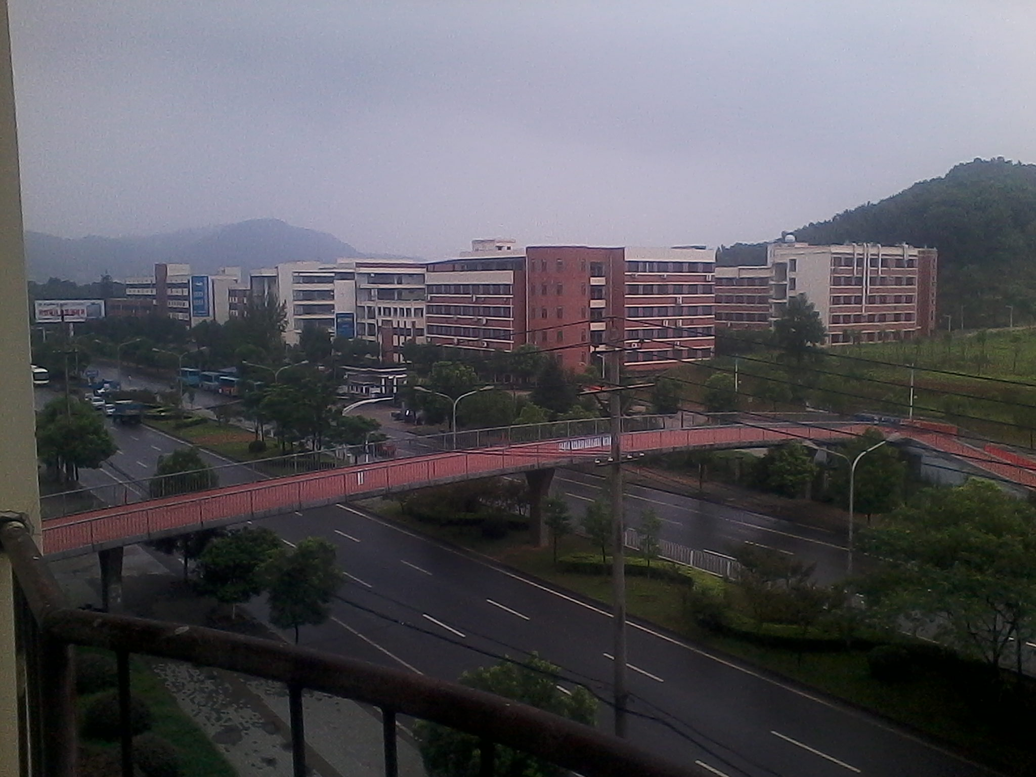 湖北理工学院义诚公寓天桥